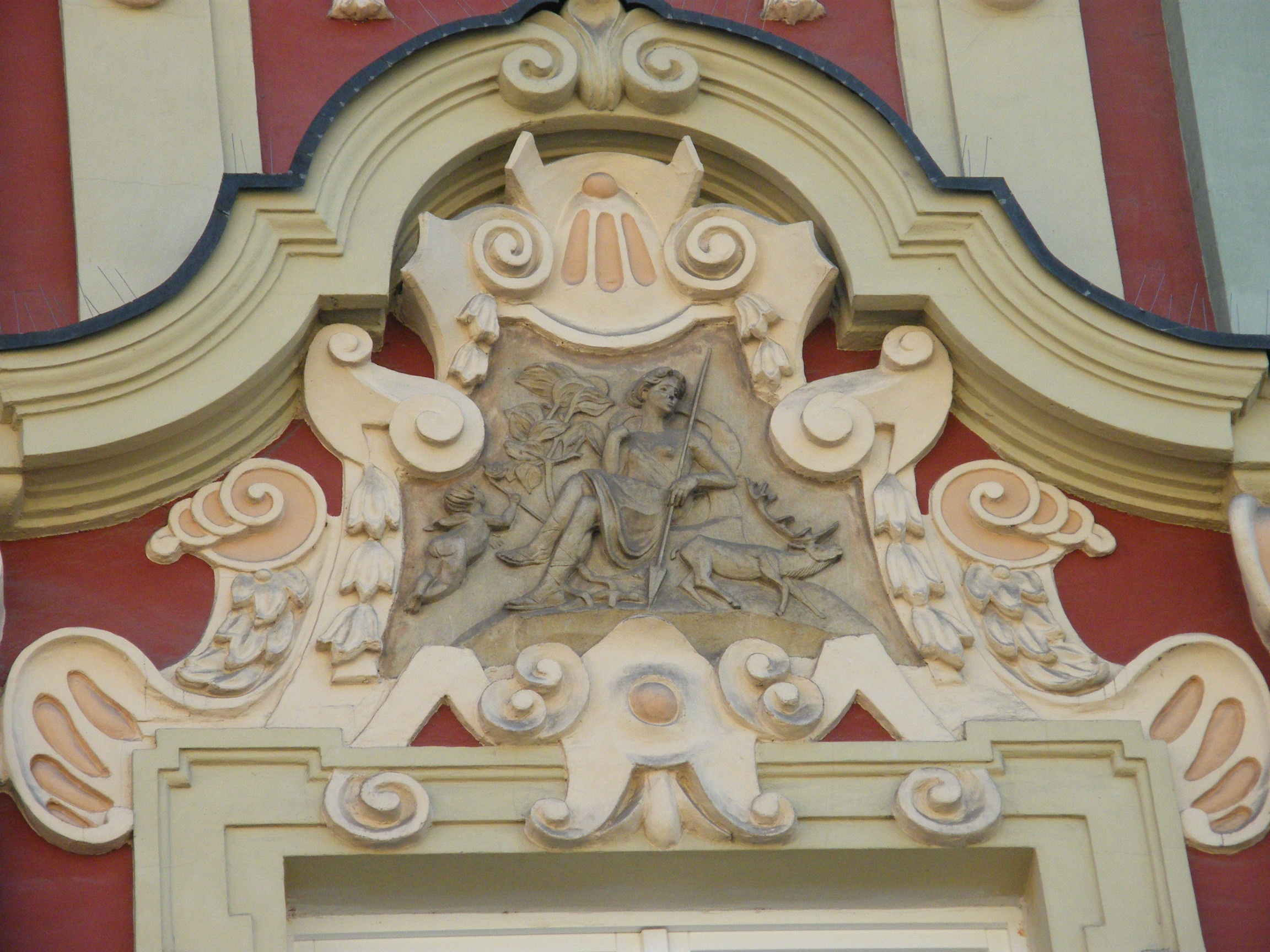 Wrocław, kamienica, XVI, XVII, po 1945